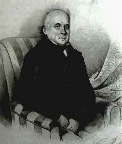 Moses Gabriel Porges von Portheim (1781 - 1870), Rakouský a český továrník židovského původu.